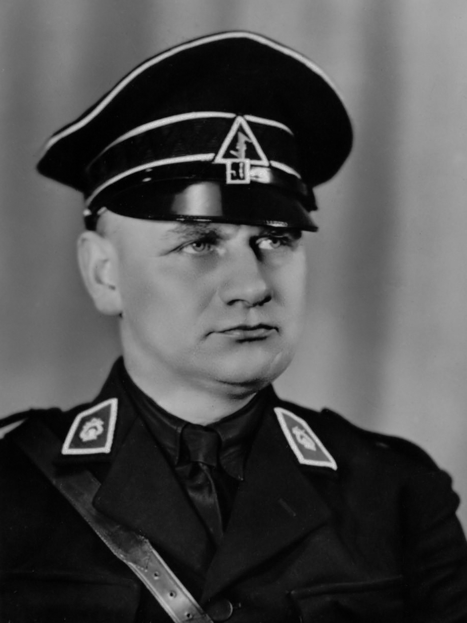 M. Schuurman, stamboeknr. 16407